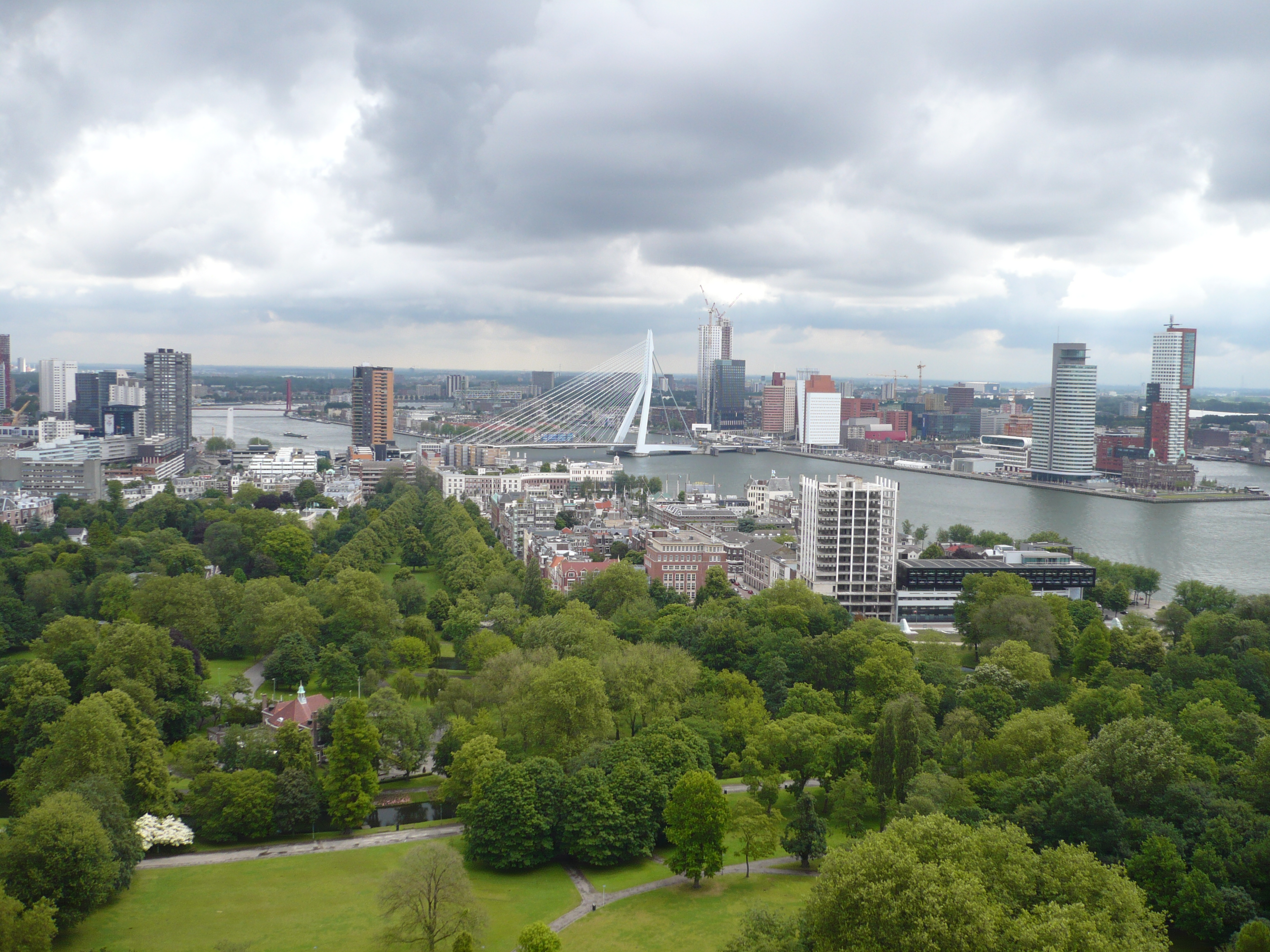 View over Rotterdam - Haven